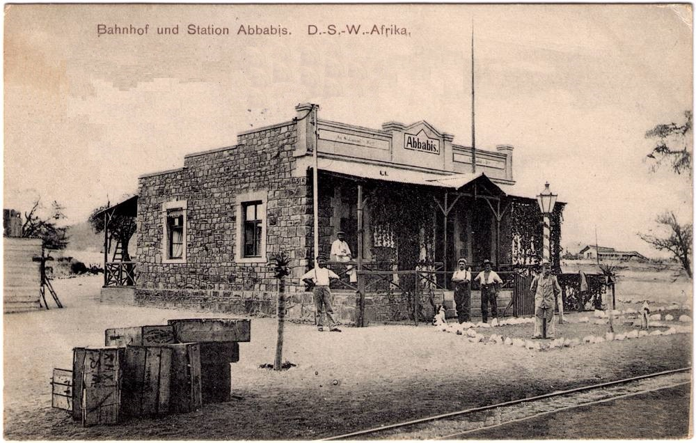 Bahnhof und Station Abbabis D.-S.-W.-Afrika